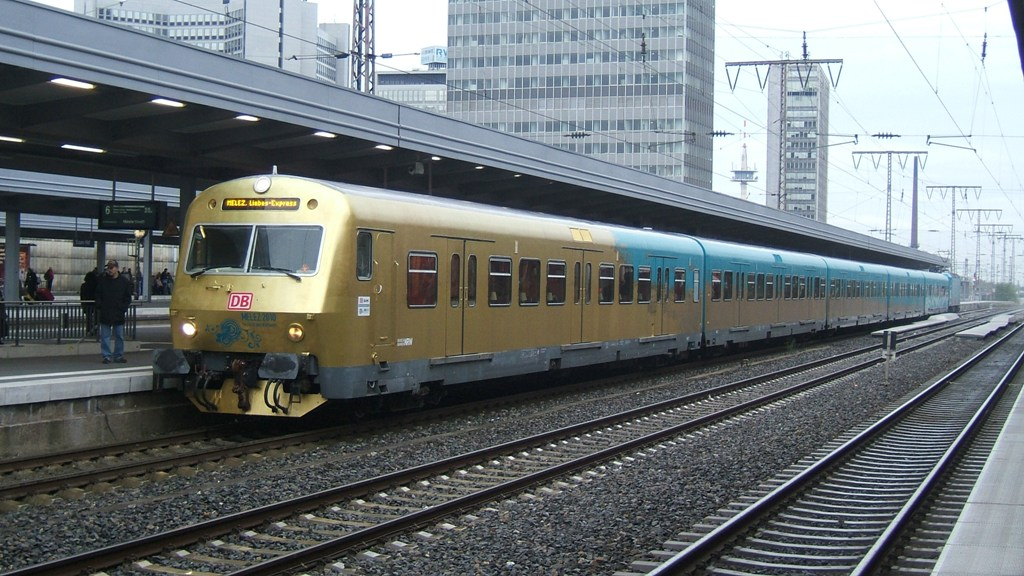 Die blau/gold umlackierten/beklebten X-Wagen des MELEZ Sonderzug mit der ebenfalls blau umlackierten/beklebten 143 247 in Essen Hauptbahnhof als MELEZ.Liebes-Express